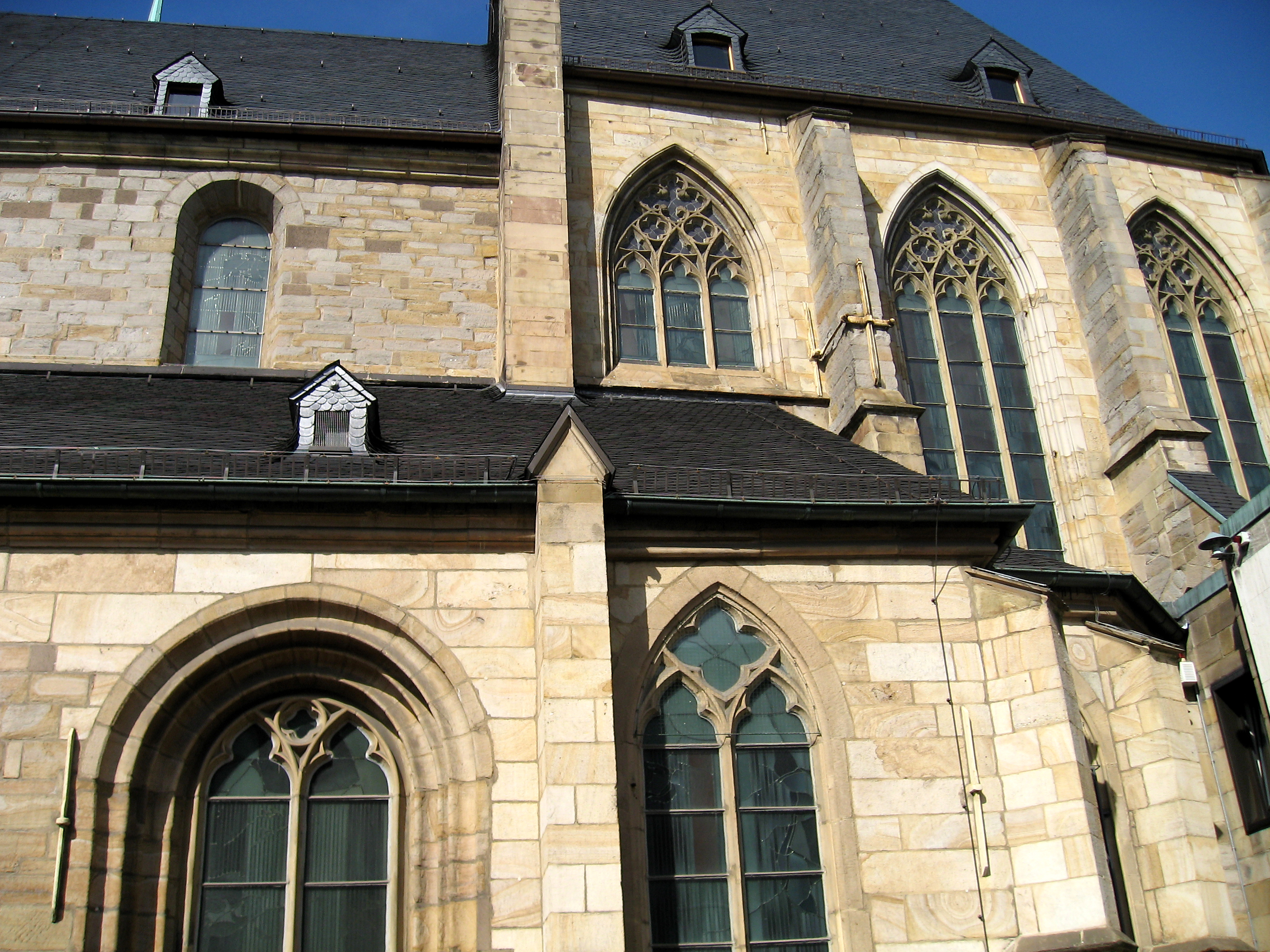 Marienkirche Dortmund, Hauptschiff beim Westeingang, Taufbecken aus Holz, Detail